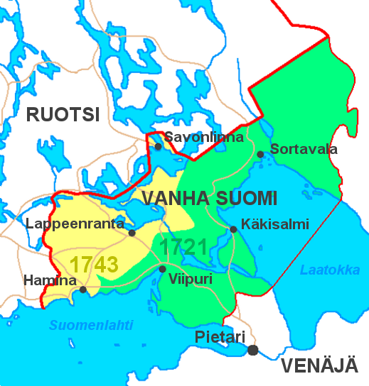 Vanhan Suomen (1721/1743–1812) kartta.